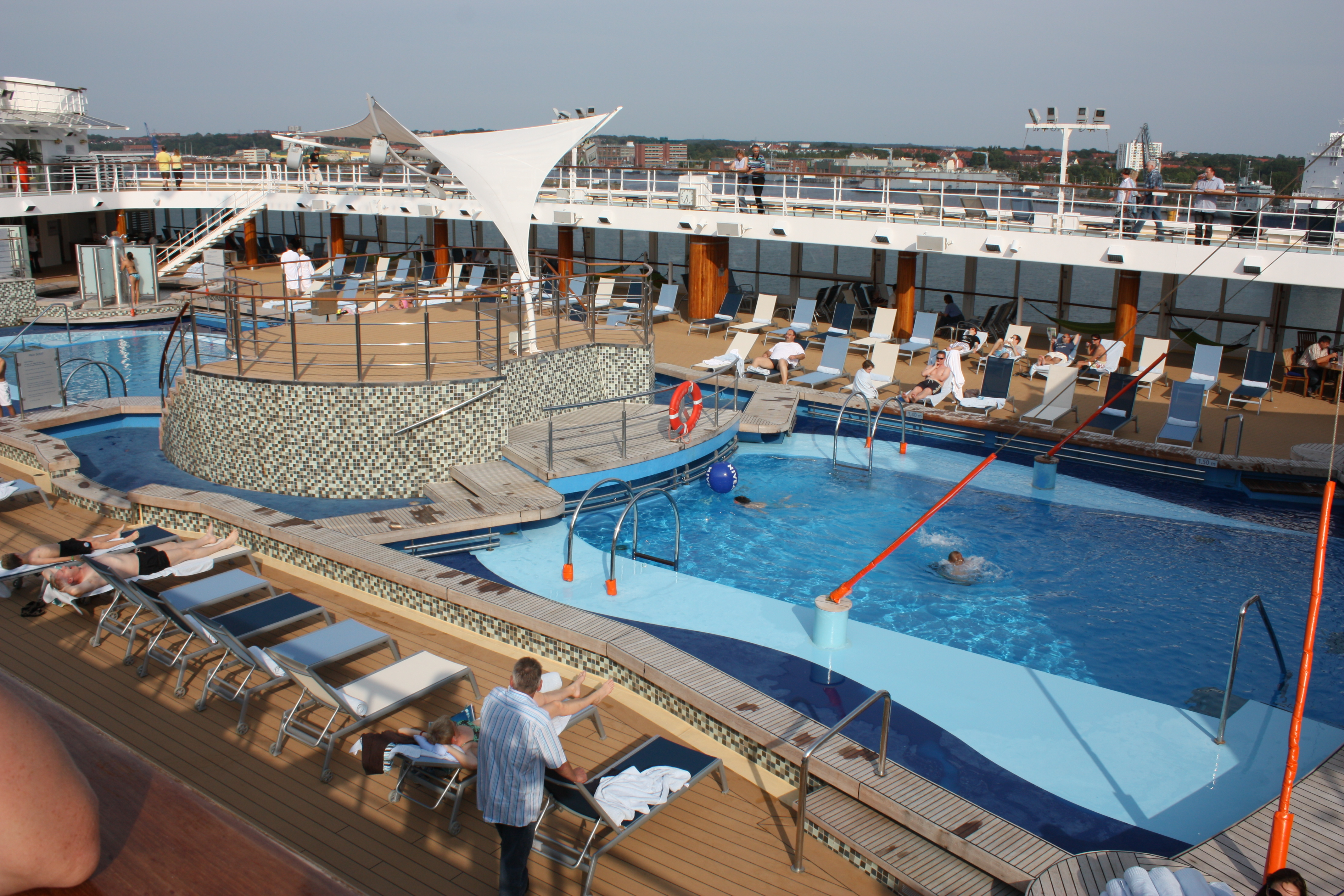 Mein Schiff: Kiel - Ostseestädte - Kiel